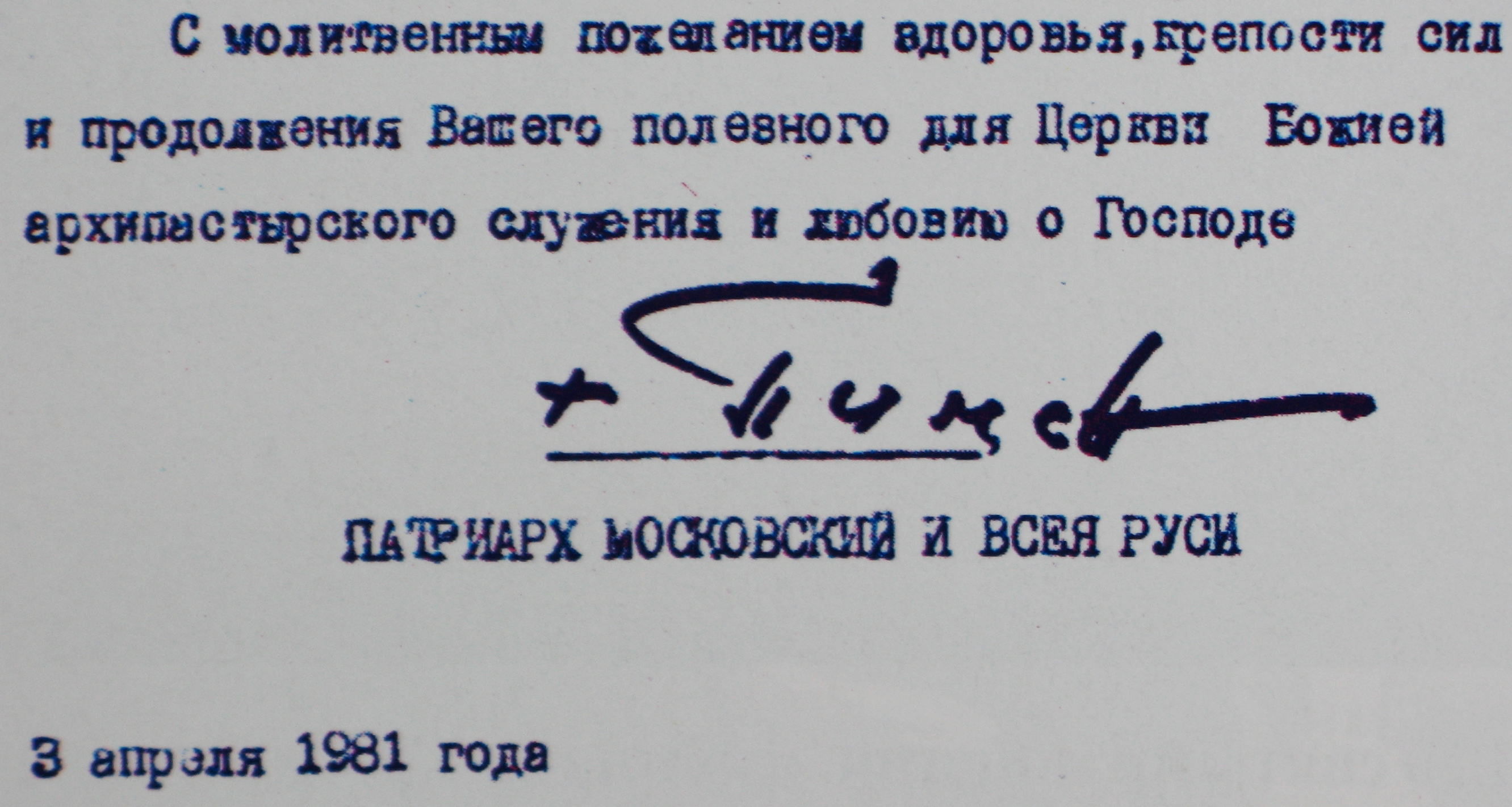 Личная подпись Патриарха Московского (не факсимиле) и Всея Руси Пимена под наградным листом архиепископу Никодиму Руснаку. Москва, СССР, 1981 год.